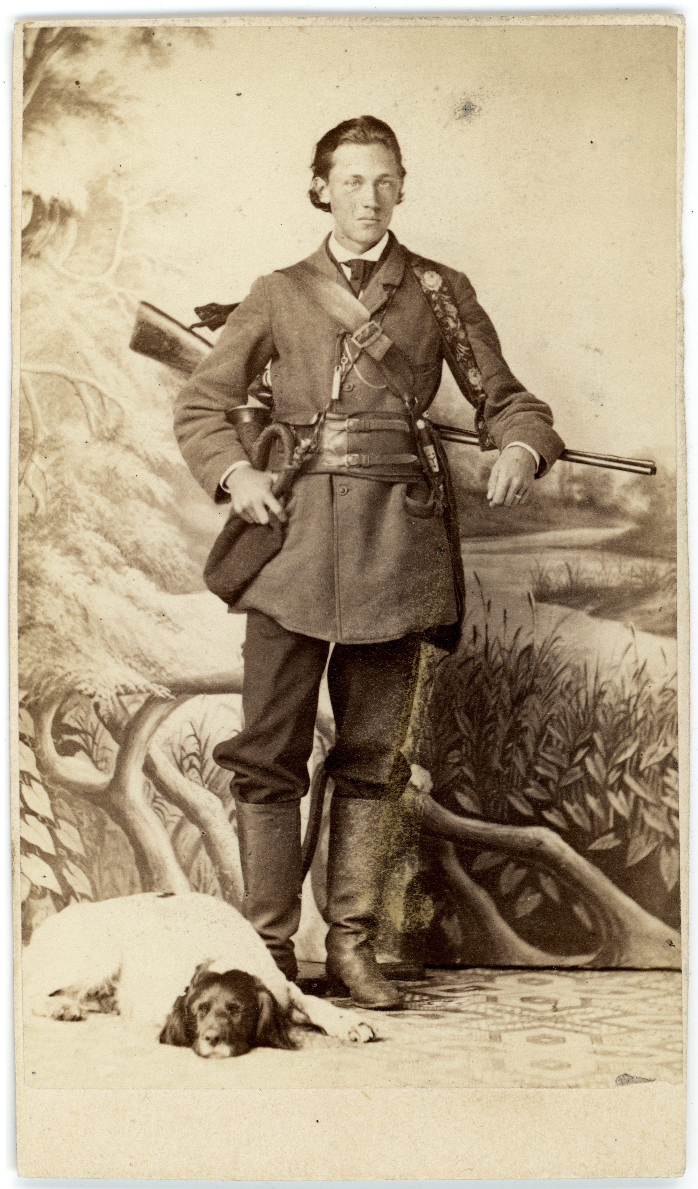 Gustaf Kolthoff, fotograferad av Carolina von Knorring (bild från Västergötalands museum)